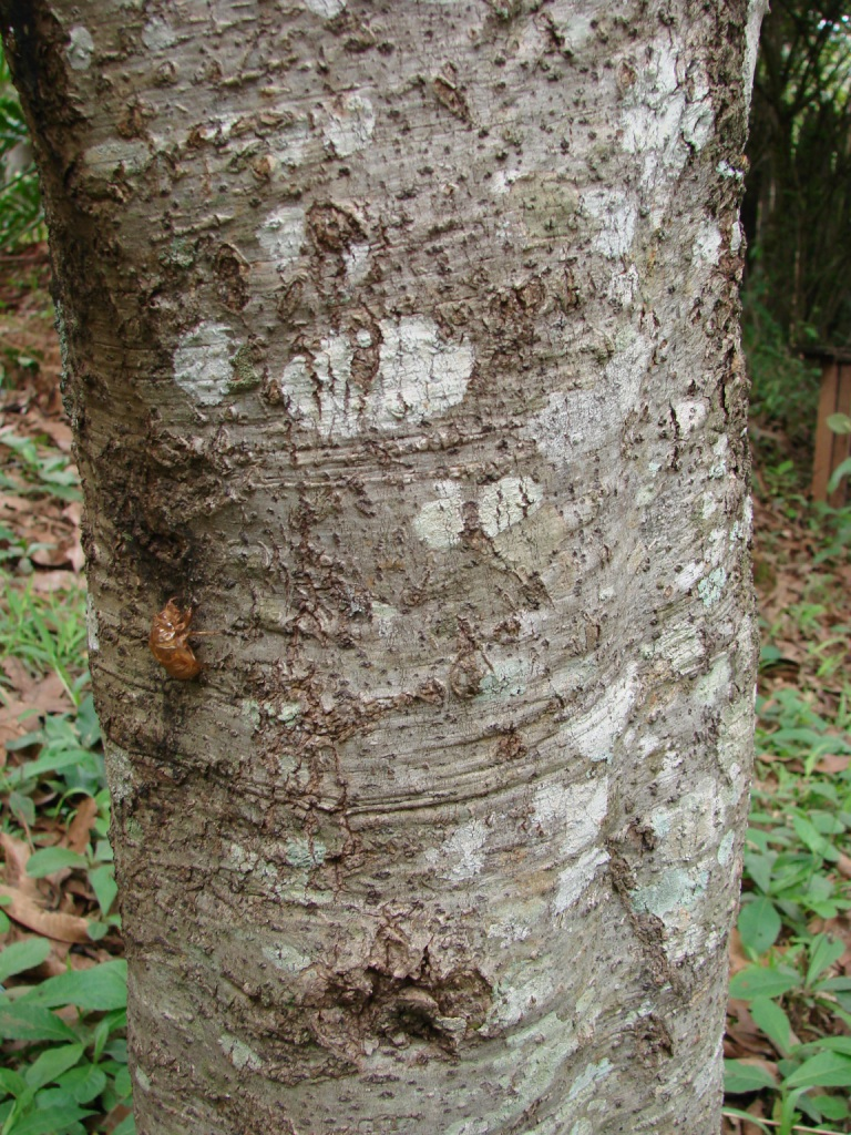 Nectandra cissiflora Nees (Sin. het. Nectandra myriantha Meisn.) - LAURACEAE - ARIE da Granja do Ipê - Brasília - Distrito Federal - Brasil.